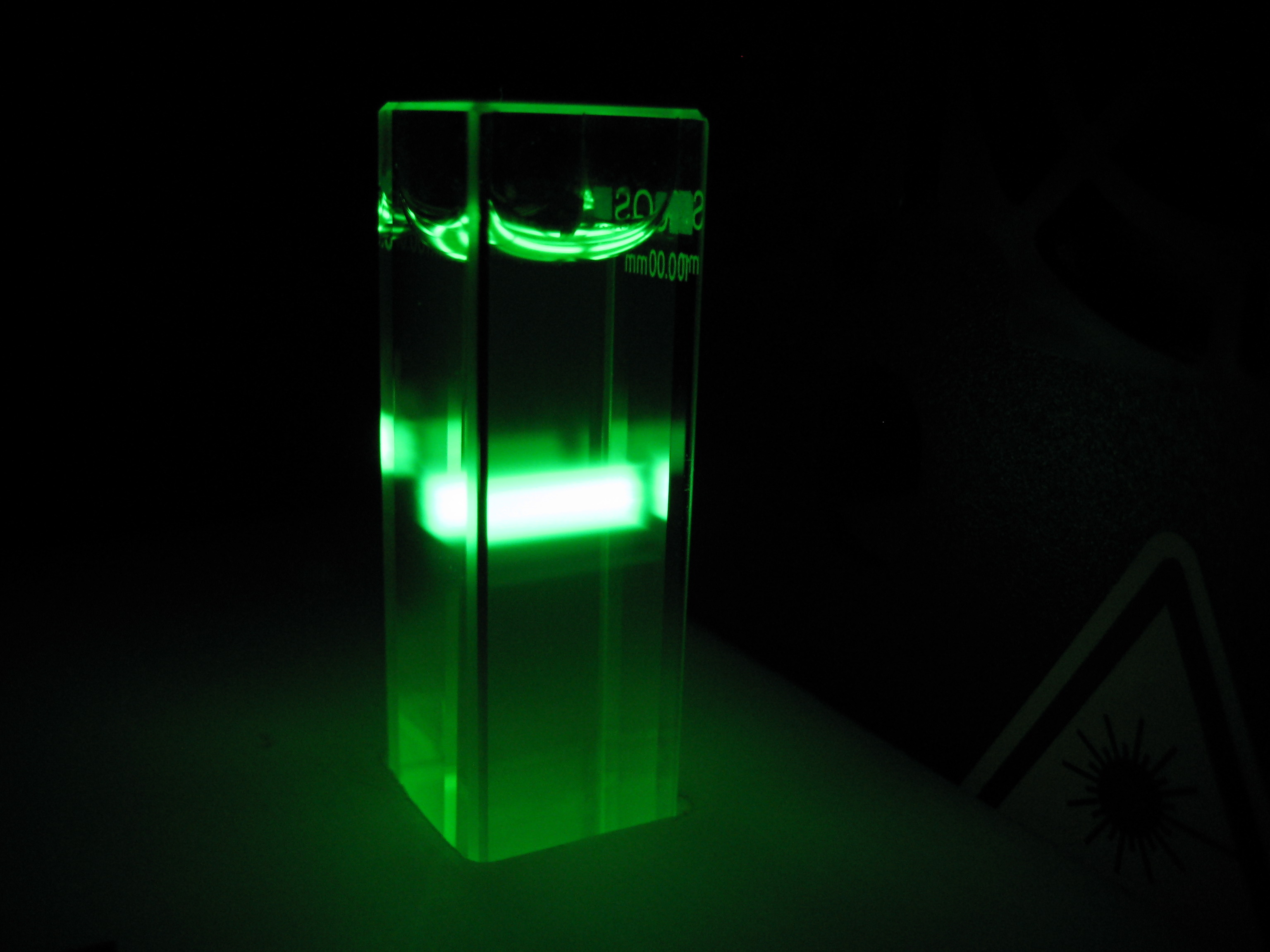 UV angeregte Fluoreszenz einer Fluoreszinprobe im Labor für marine Physik und Sensorik des Instituts für marine Ressourcen.